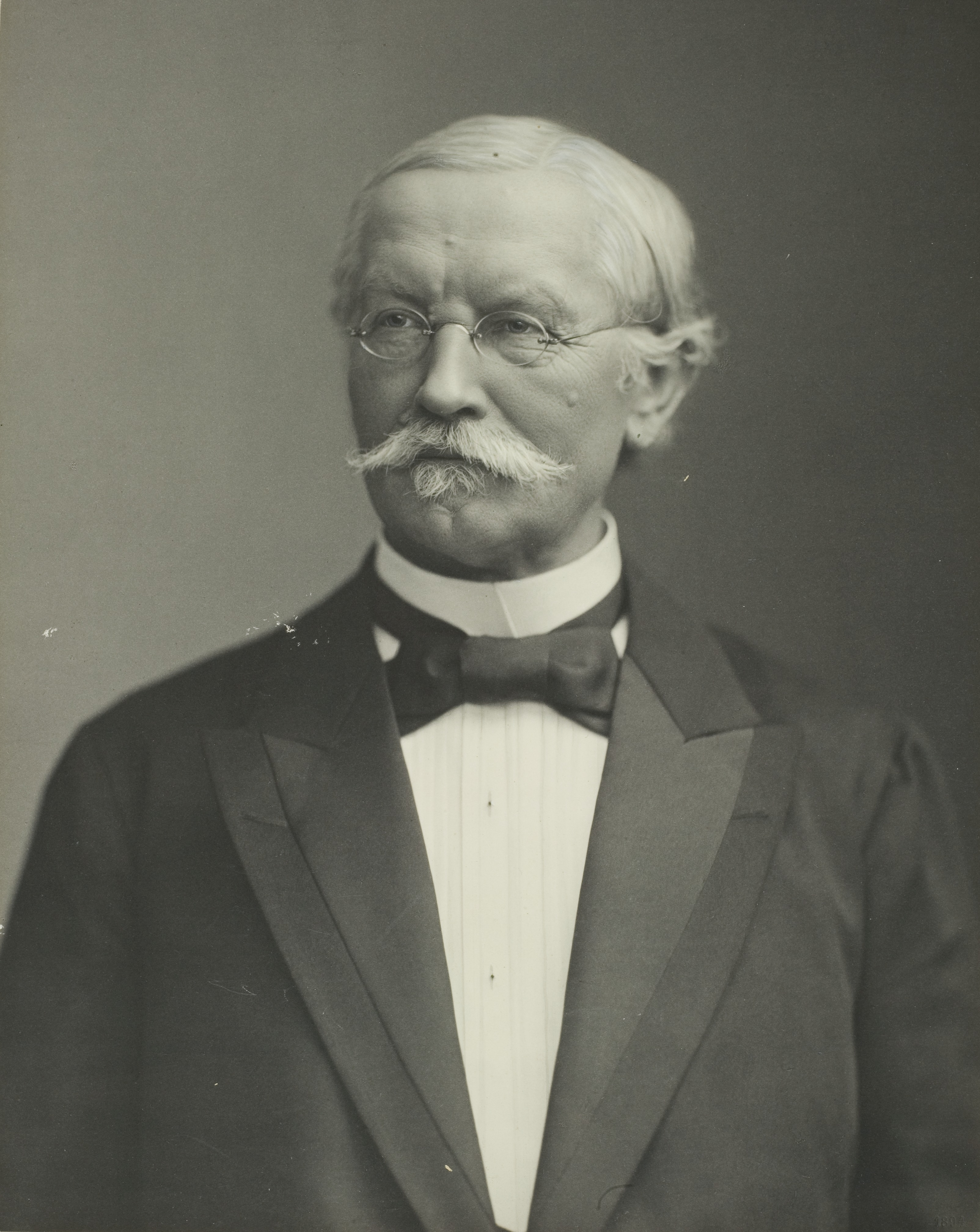 Karl Friedrich Rudolf Heinze, Strafrechtslehrer, 1873–1896 (?) in Heidelberg, Rektor 1883